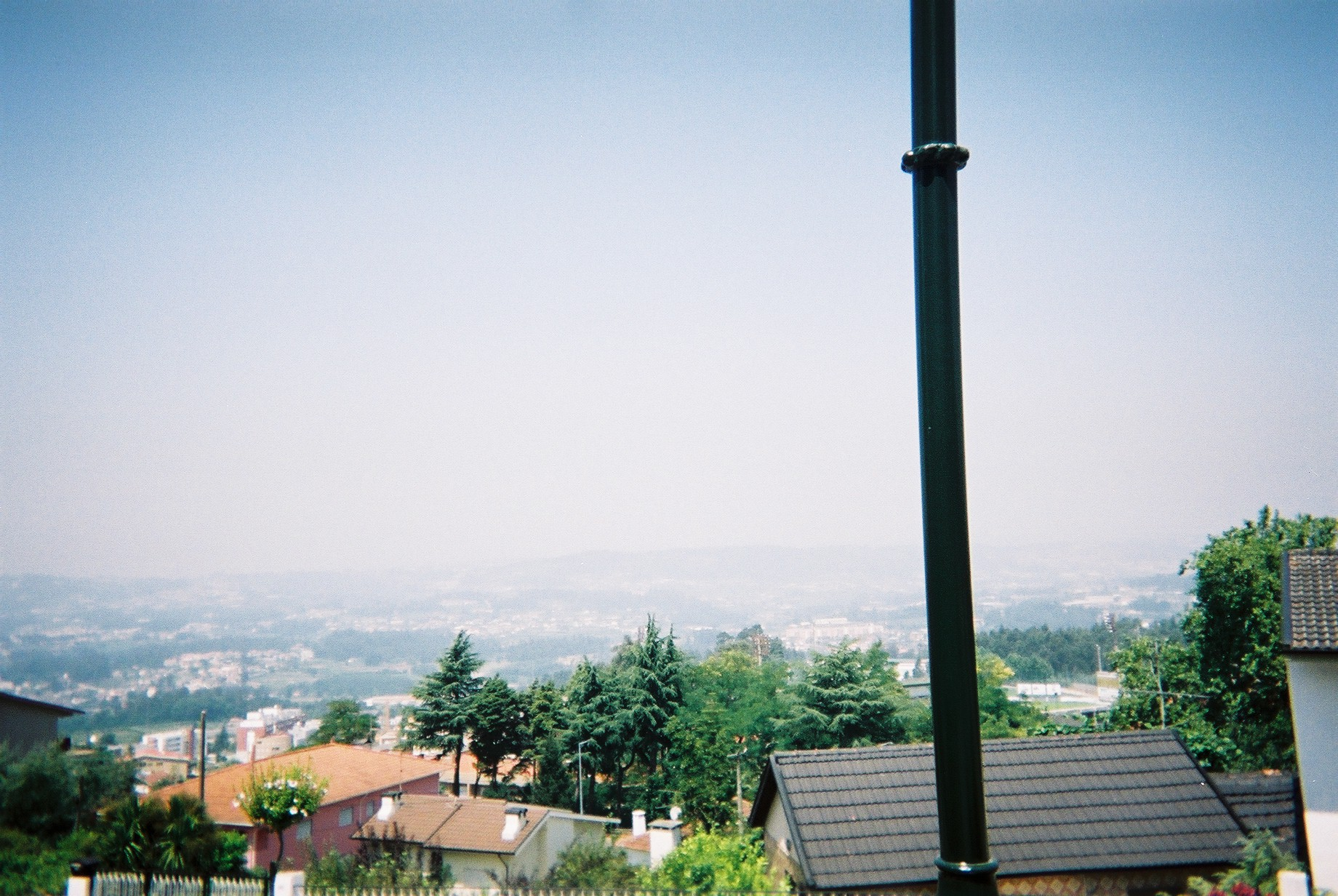 Zelfgemaakte foto